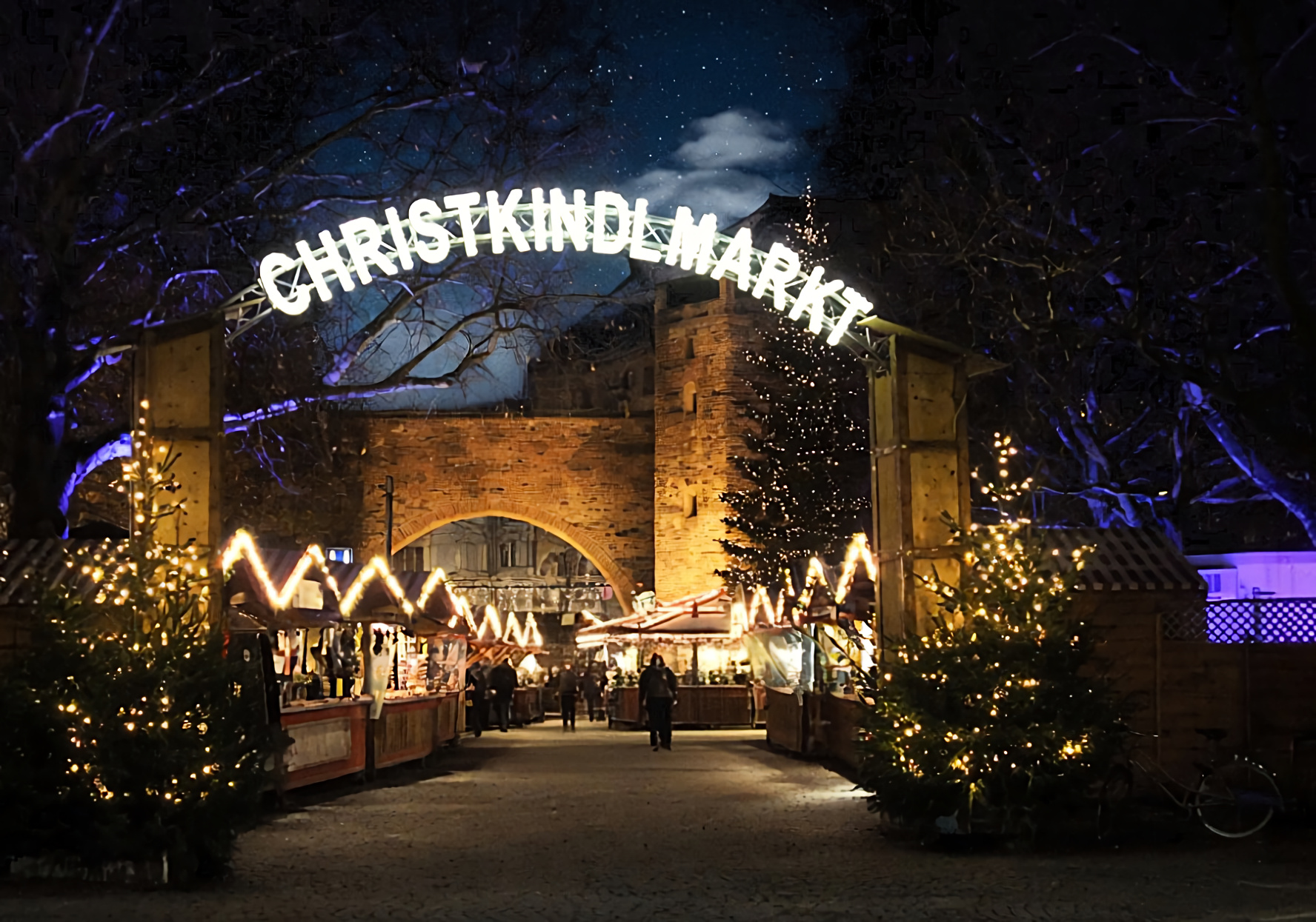 Deutschland, Bayern, München, Sendlinger Tor Platz, Christkindlmarkt